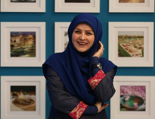 زهره هاشمی